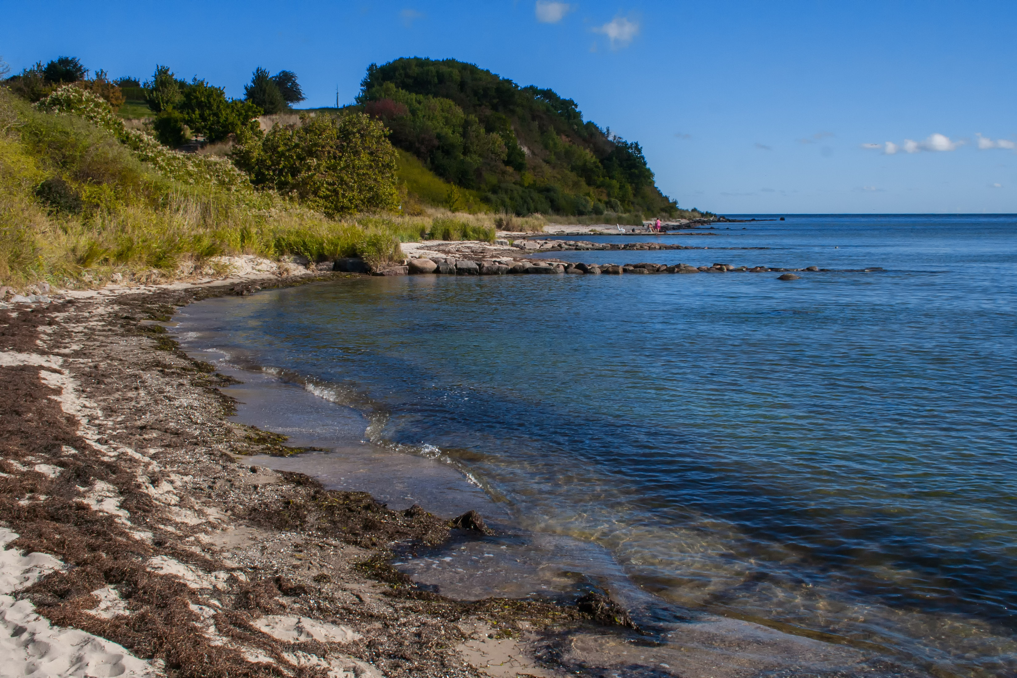 Südperd, Thiessow, Rügen, Strand, Naturschutzgebiet „Mönchgut“, Landschaftsschutzgebiet, EU-Vogelschutzgebiet, Biosphärenreservat